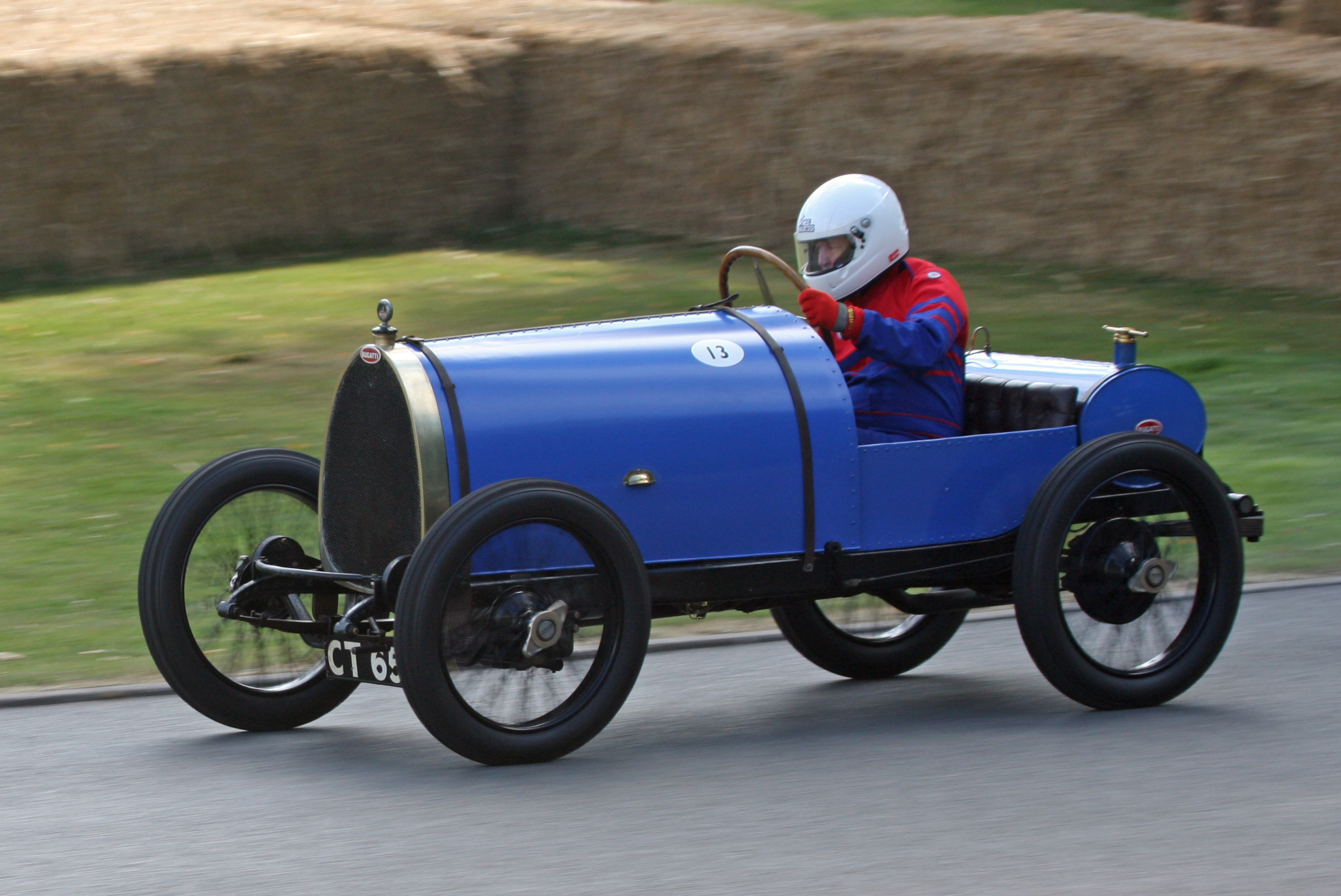 Goodwood 2009